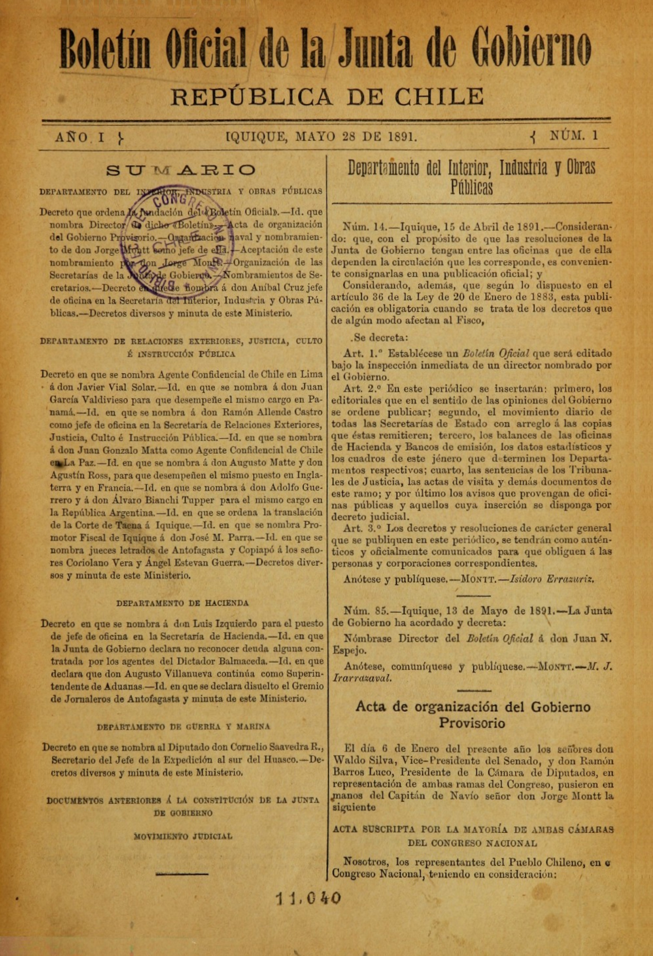 El Boletín Oficial de la Junta de Gobierno fue el diario oficial de la Junta de Gobierno chilena, formada por los opositores al presidente José Manuel Balmaceda. En él se publicaron los documentos oficiales de la Junta de Gobierno y de sus Ministerios de Estado. Su primer número corresponde al 28 de mayo de 1891 y fue impreso en Iquique. El ejemplar del 5 de septiembre de 1891 se imprimió en Santiago. Su última edición fue la del 10 de noviembre de 1891. Su redactor fue Jorge Huneeus Gana El Diario Oficial de la República de Chile se siguió publicando, pero incluía las medidas del presidente Balmaceda y sus ministros de Estado.